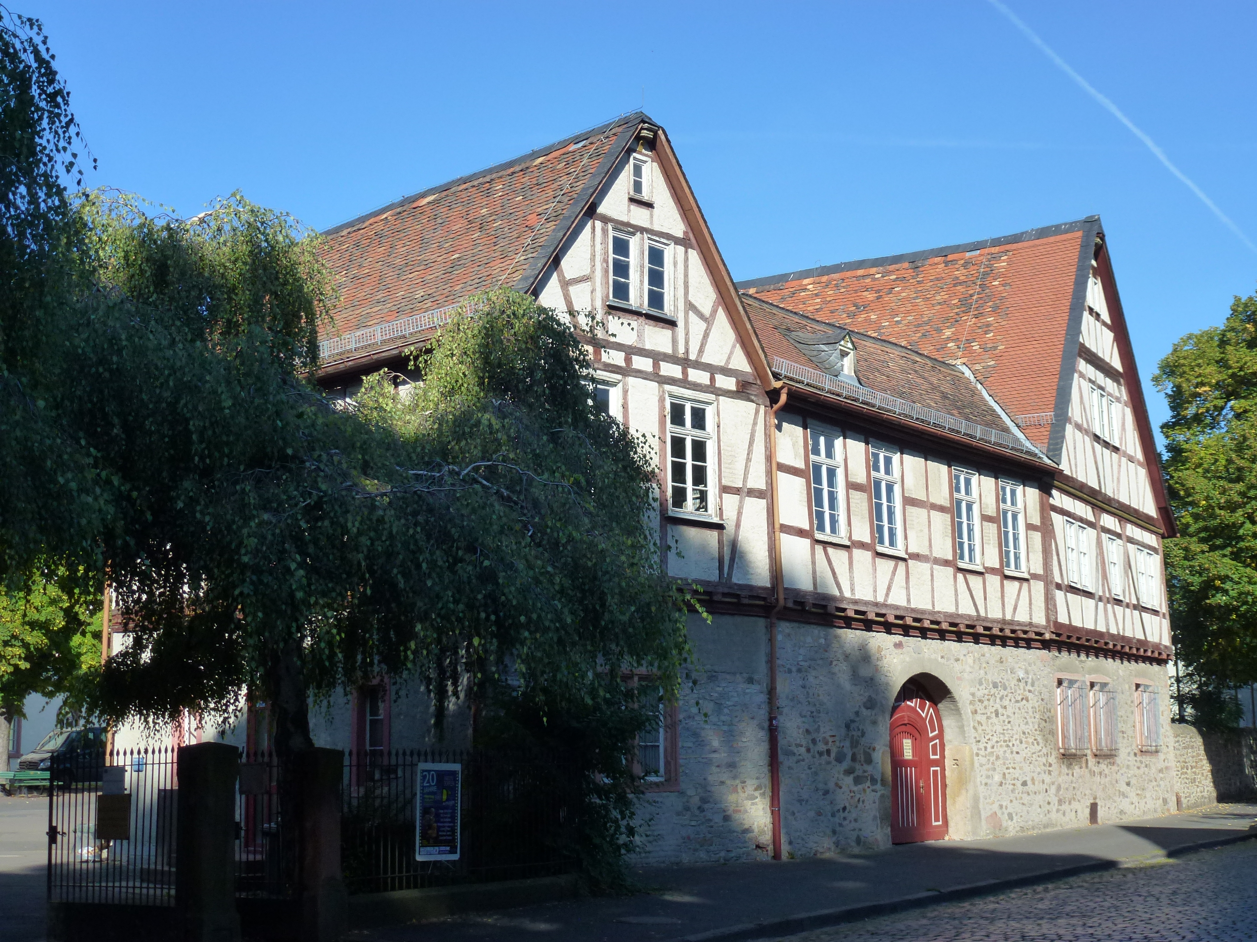 Die sogenannten Burgmannenhäuser in der Burg in Friedberg (Hessen)